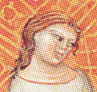 Kněžna Božena